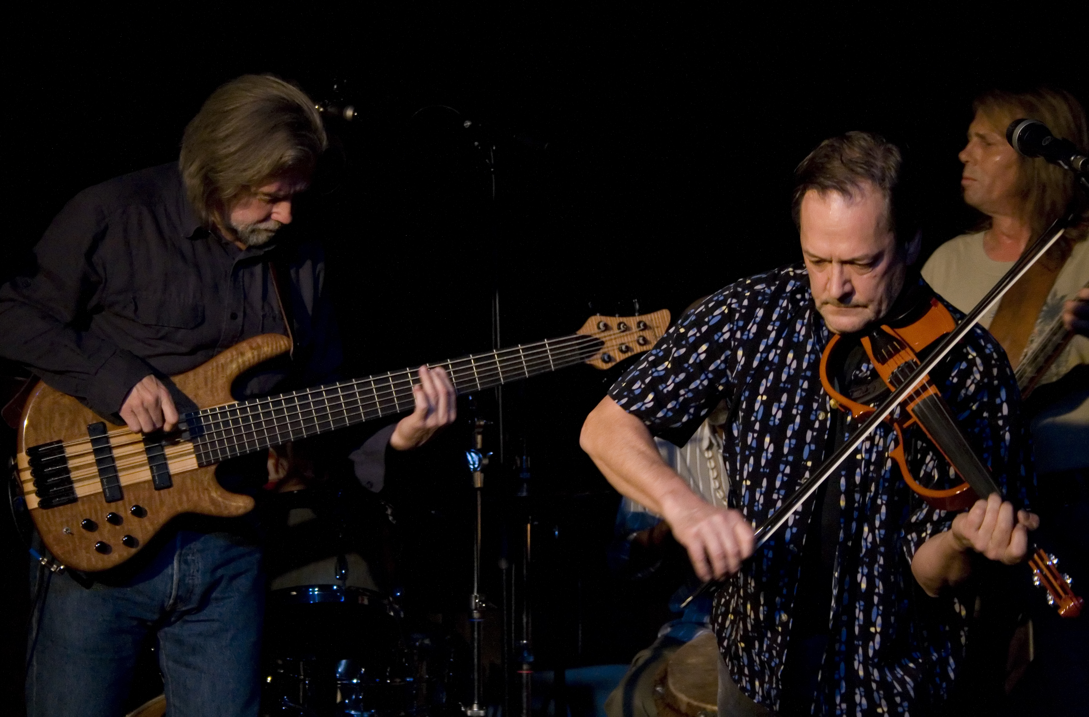 Kebnekajse på The Lounge i Falkenberg 23 oktober 2009